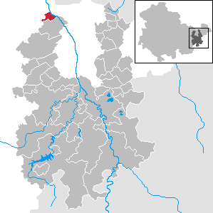 Caaschwitz in Thuringia - District Greiz